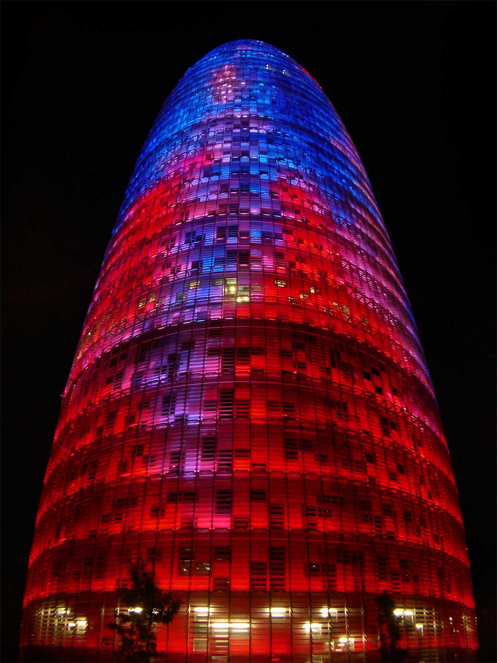 Vista nocturna de la Torre AgBar